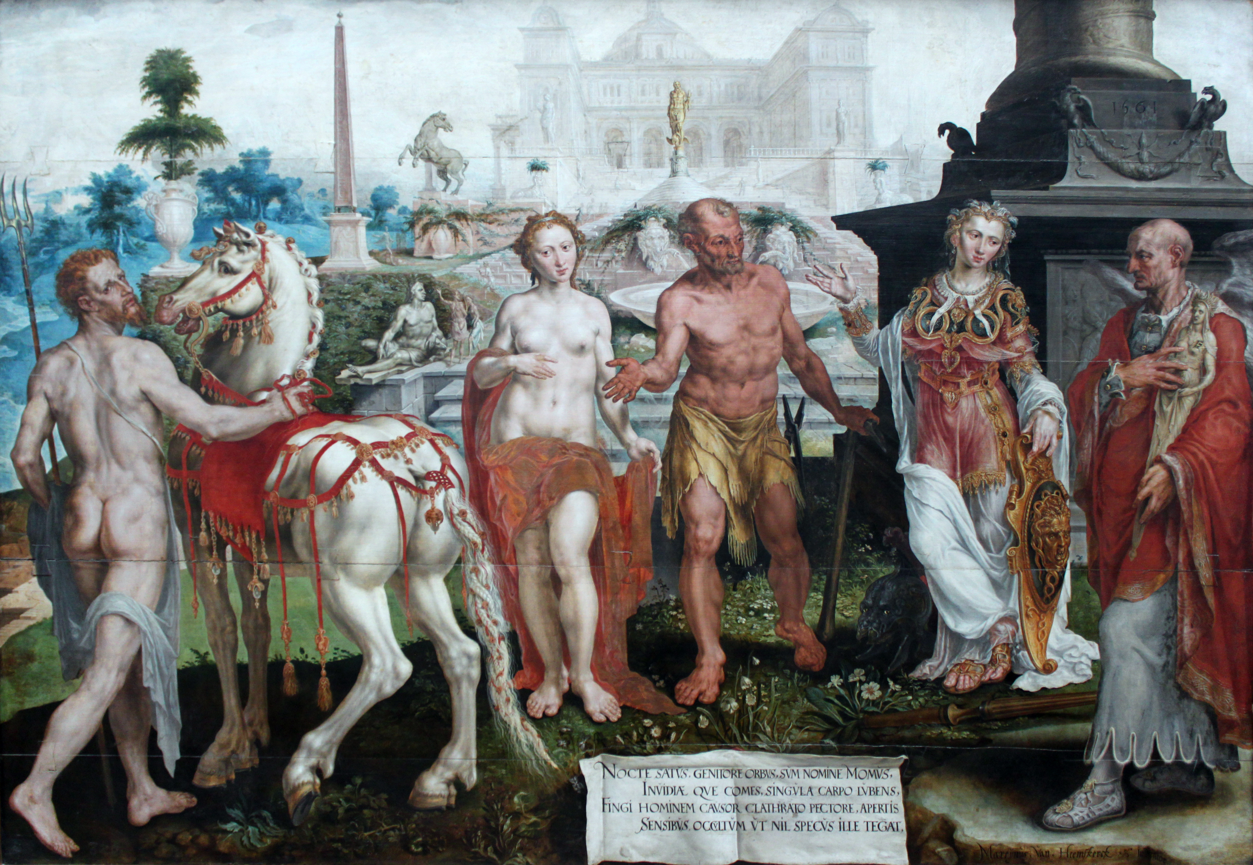 links Neptun, in der Mitte Vulkan, daneben Minerva